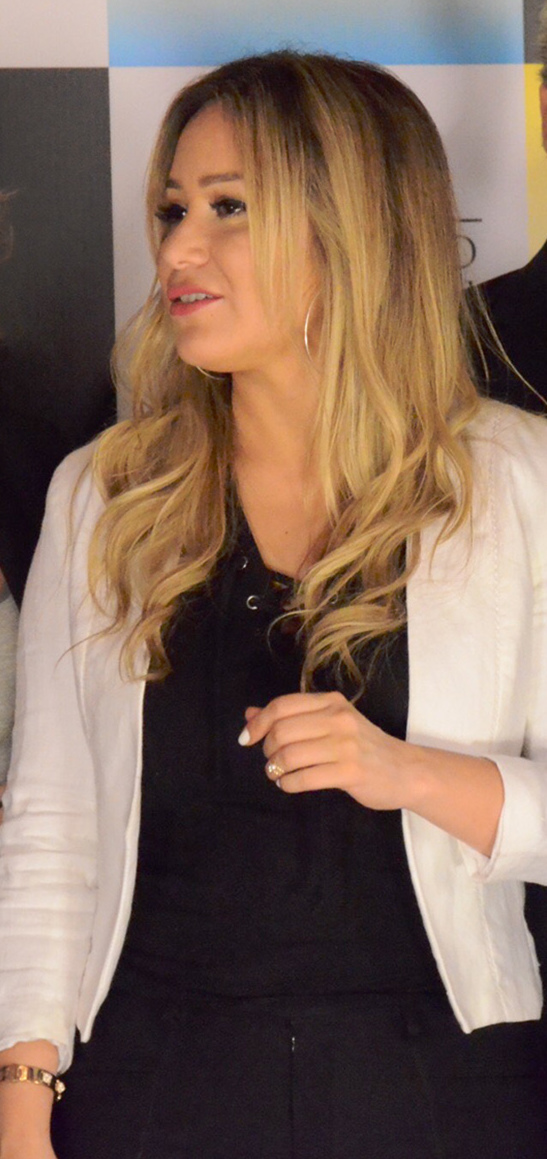 Horacio Rodríguez Larreta, en el lanzamiento del festival de música Únicos junto a Marcela Morelo y Karina “La Princesita” en el teatro Colón en 2017.